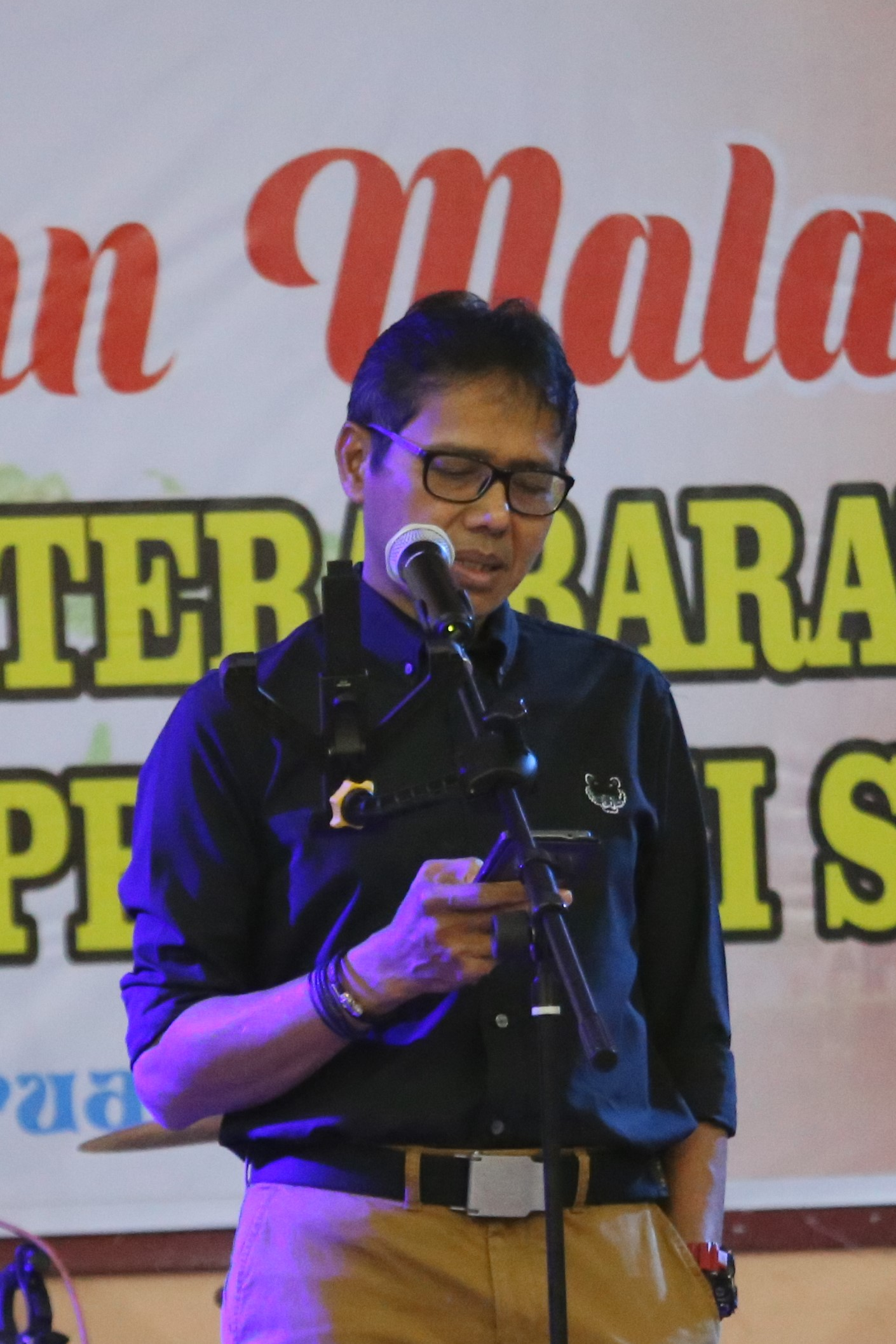 Gubernur Sumbar berpantun